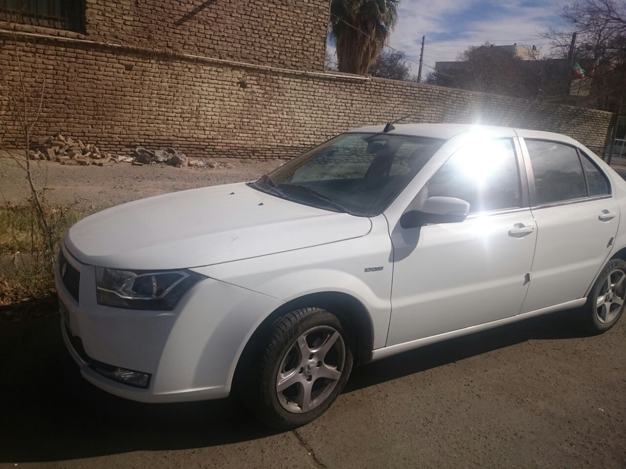 خودرو از نمایی دیگر